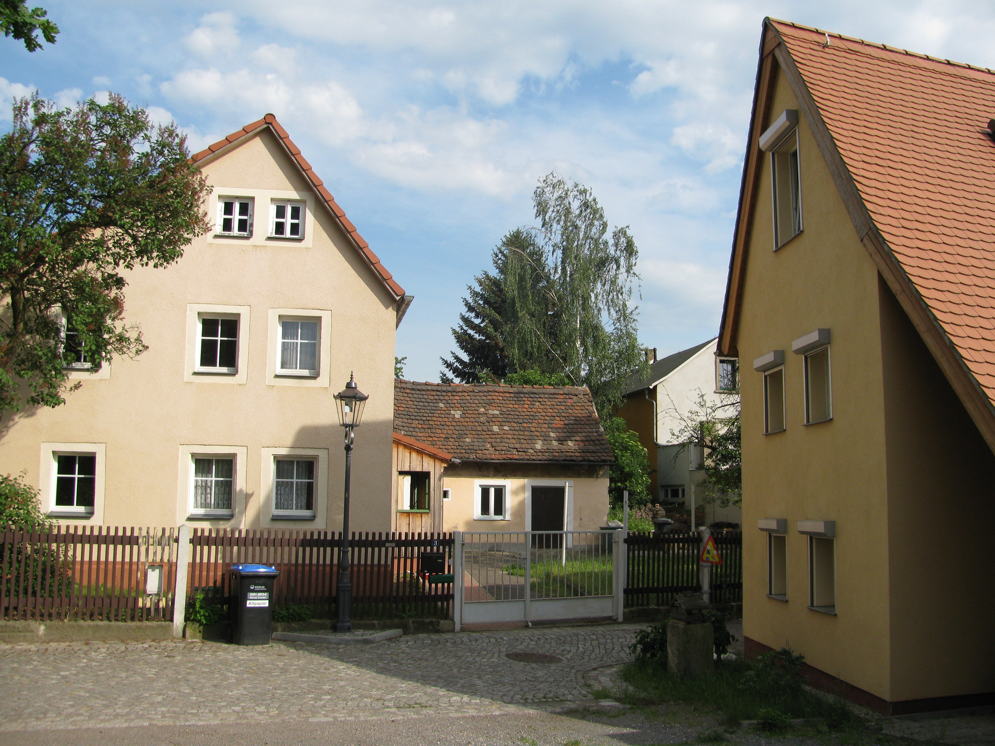 Gebäude im Dorfkern von Meußlitz, Stadtteil von Dresden